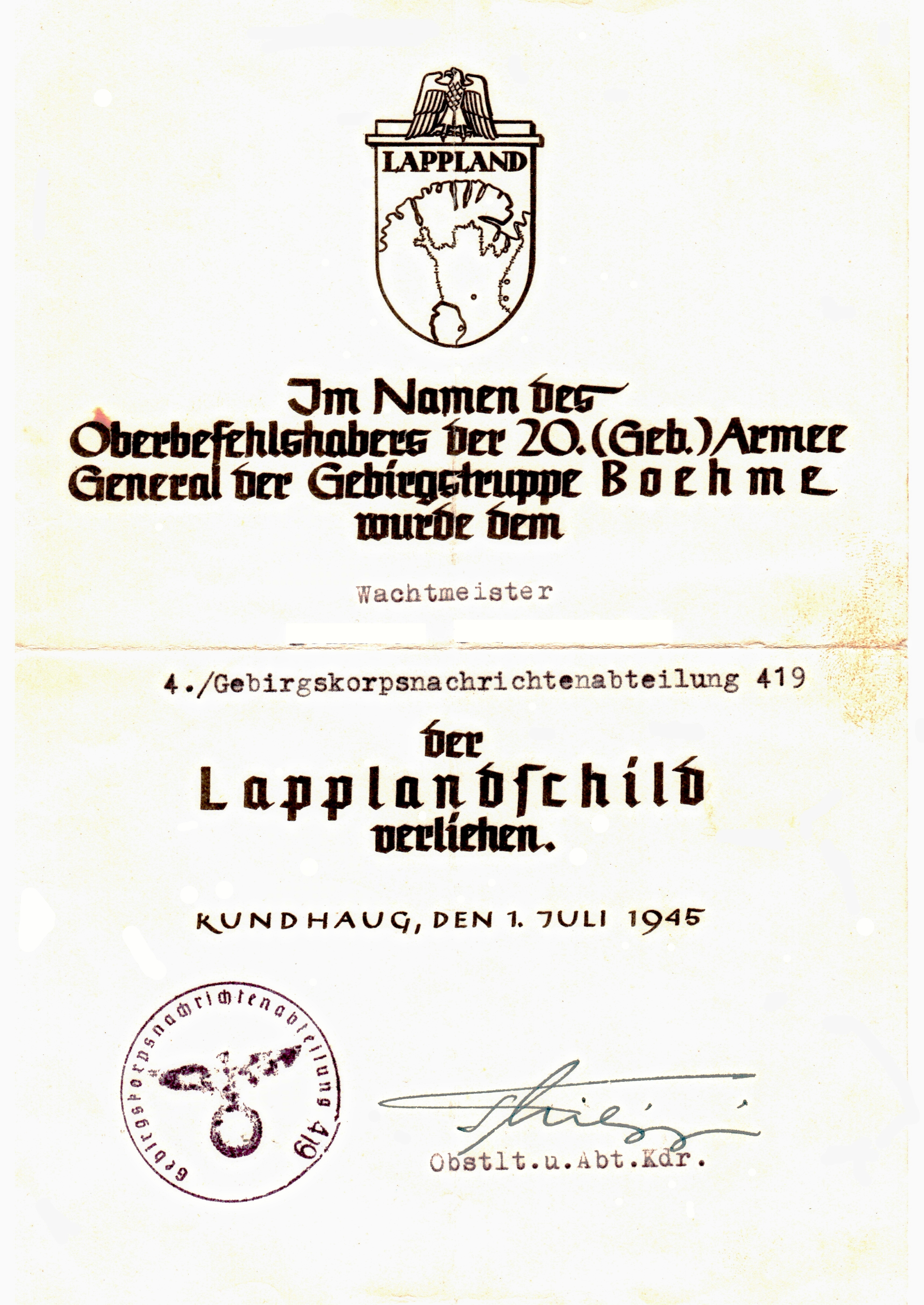 Urkunde zur Verleihung des Lapplandschilds an einen Funker am Ende des 2. Weltkriegs (Name entfernt)